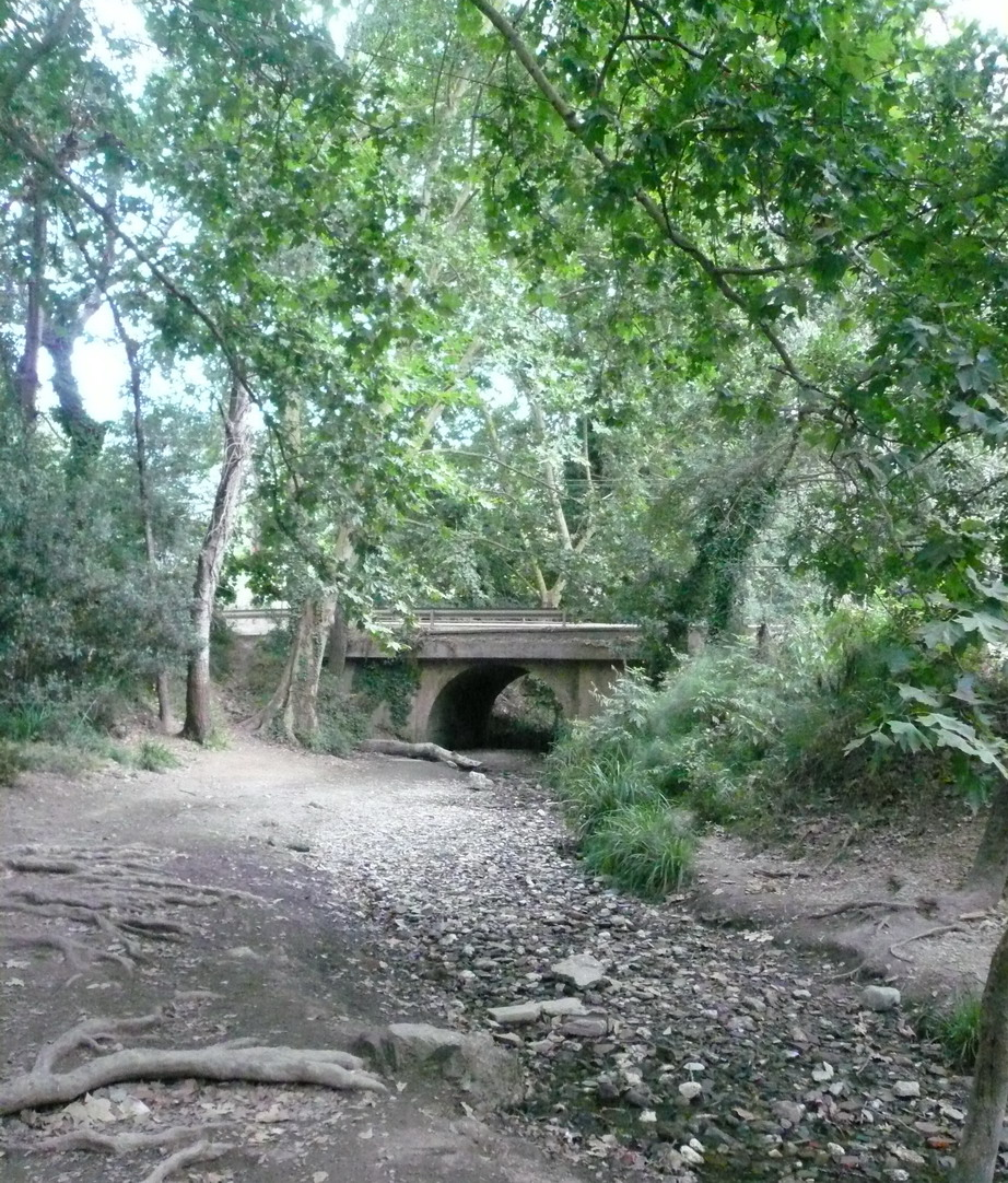 La riera de Vallvidrera (o de la Rierada) a la Rierada, Molins de Rei, Baix Llobregat, Catalunya